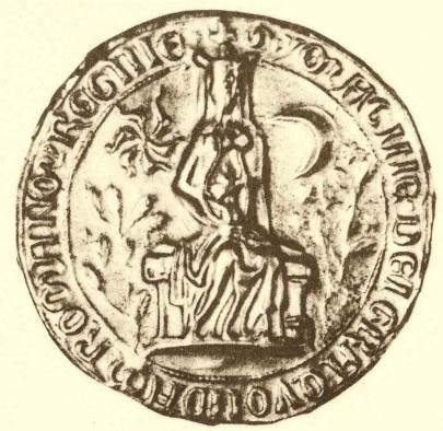 de: Dies ist ein Scan des historischen Buches, es zeigt ein Siegel der Imagina von Limburg: en: This is a scan of the historical document: Title: Die Siegel der deutschen Kaiser und Könige v. 1 (751 - 1347)